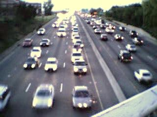 Interstate I-25, in der Nähe von Denver